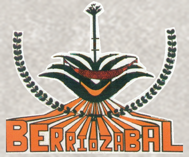 Logo ofBerriozabal, Chiapas